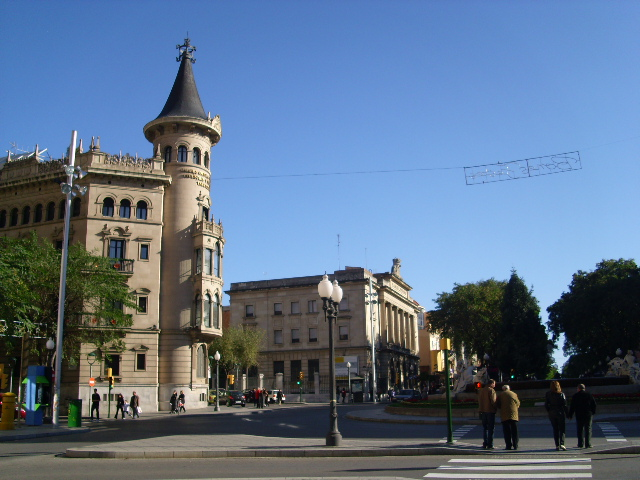 Rambla Nova, Tarragona, novembro 2009